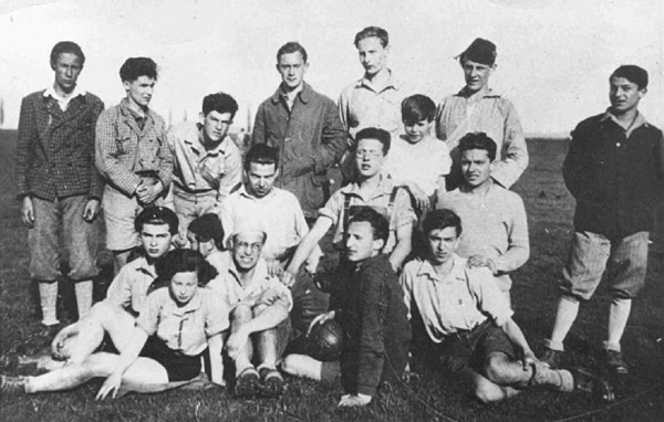 Burgenlandfahrt der "Achtzehner", einer Gruppe der Vereinigung Sozialistischer Mittelschüler, Ostern 1929. 1. Reihe, v. l. n. r.: Hugo Ebner, Marika Szécsi, Hans Likier, Kosta Panizza, Toni Kerner, Leo Turnheim; 2. Reihe: Max Dünner, Joseph Simon, Peter Strasser, Jura Soyfer, Josef Schwarzwald; 3. Reihe: unbekannt, Walter Häuselmayer, Mitja Rapoport, Josef Schneeweiß, Alfred Rußwurm, Karl Kerndl. (Foto: DÖW 3844) - 2/12.